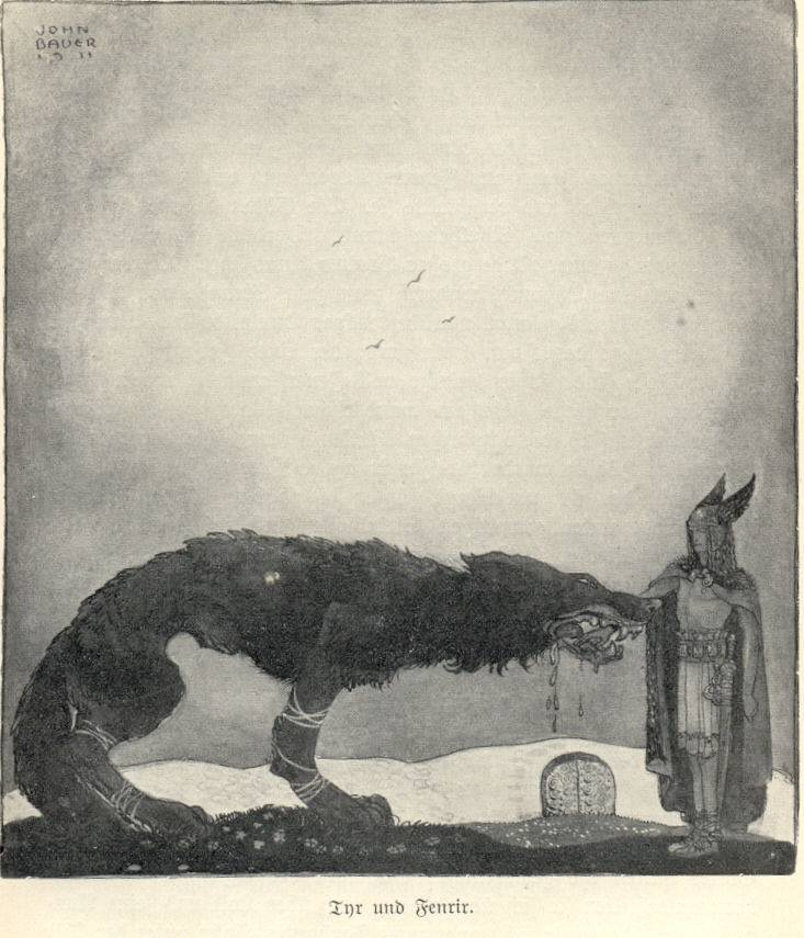 for Our Fathers' Godsaga by Viktor Rydberg